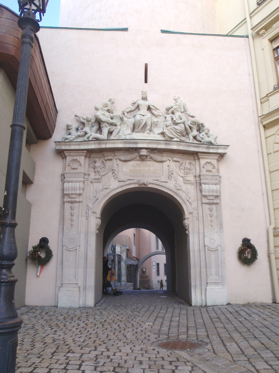 Sopron Tűztorony helyreállított és kiszélesített kapuja